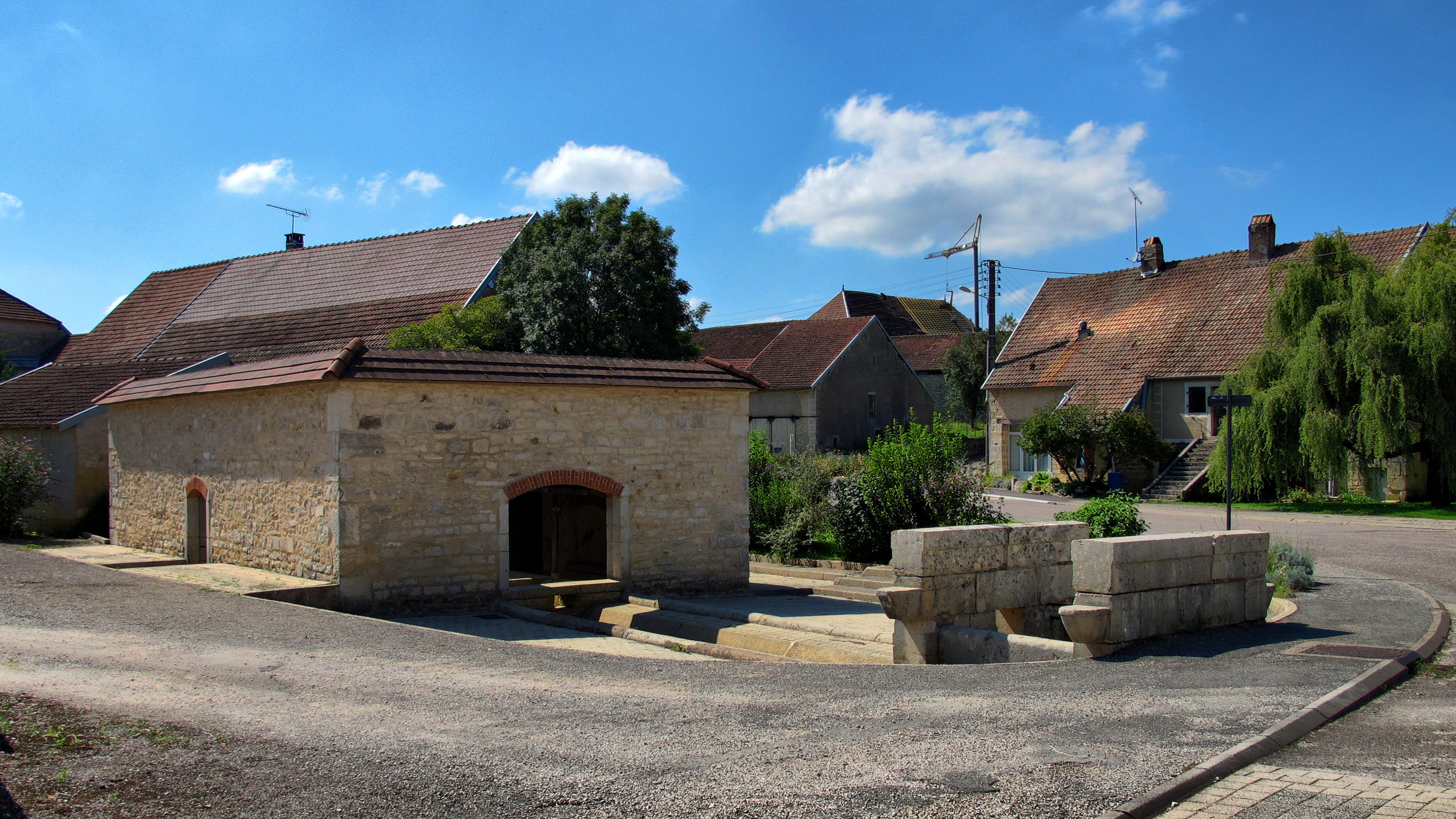 Le lavoir à impluvium